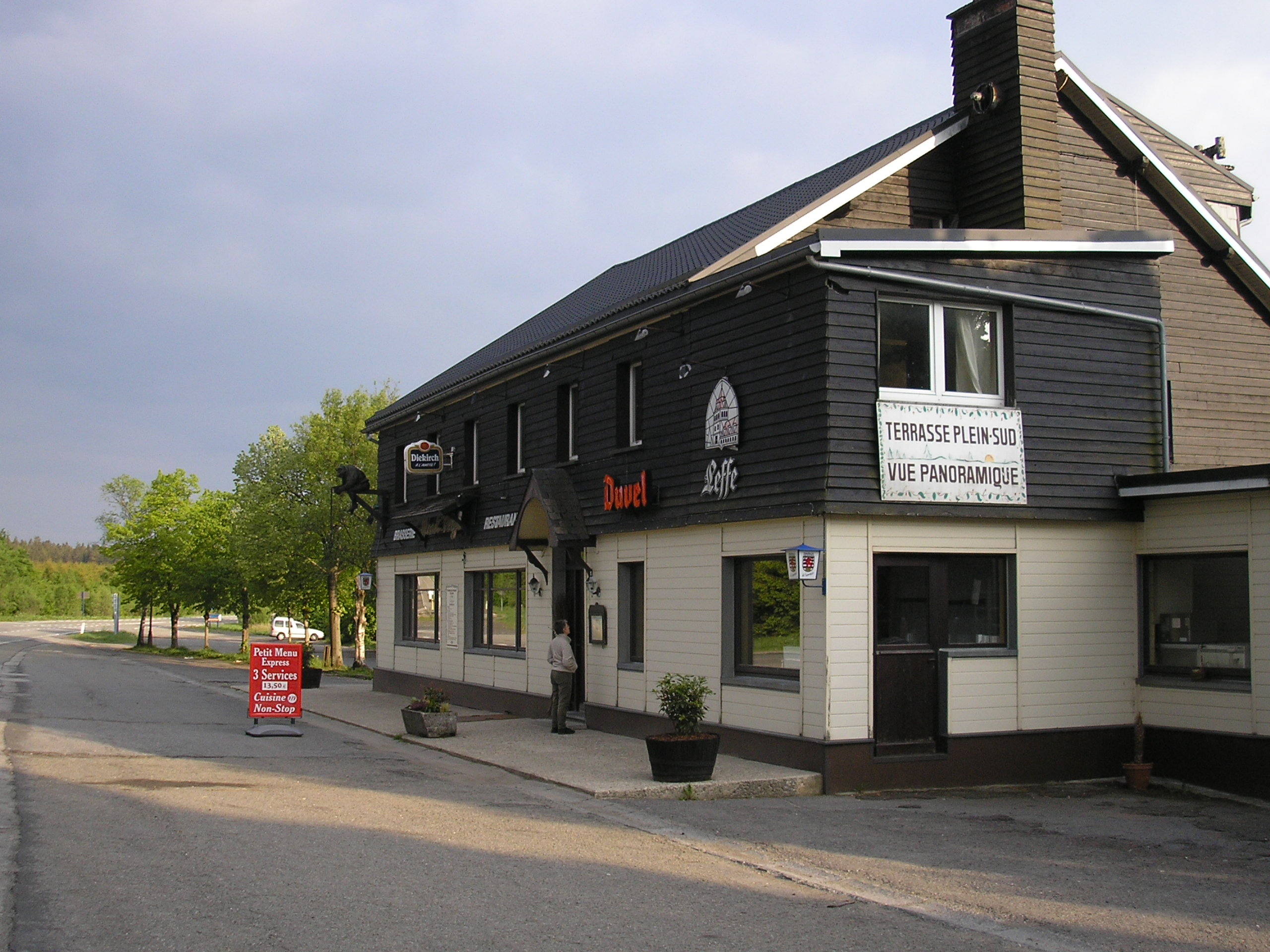 Mont Rigi, Waimes, East Belgium